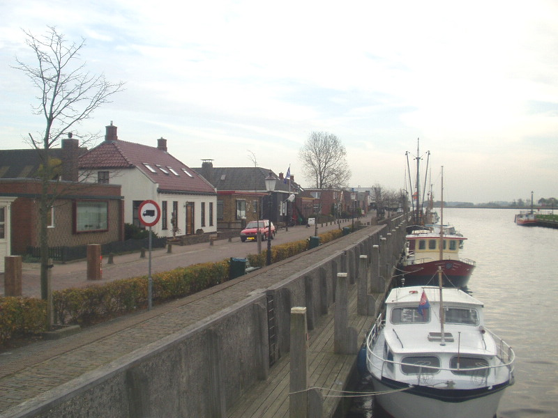 Zoutkamp, bij de haven aan het Reitdiep